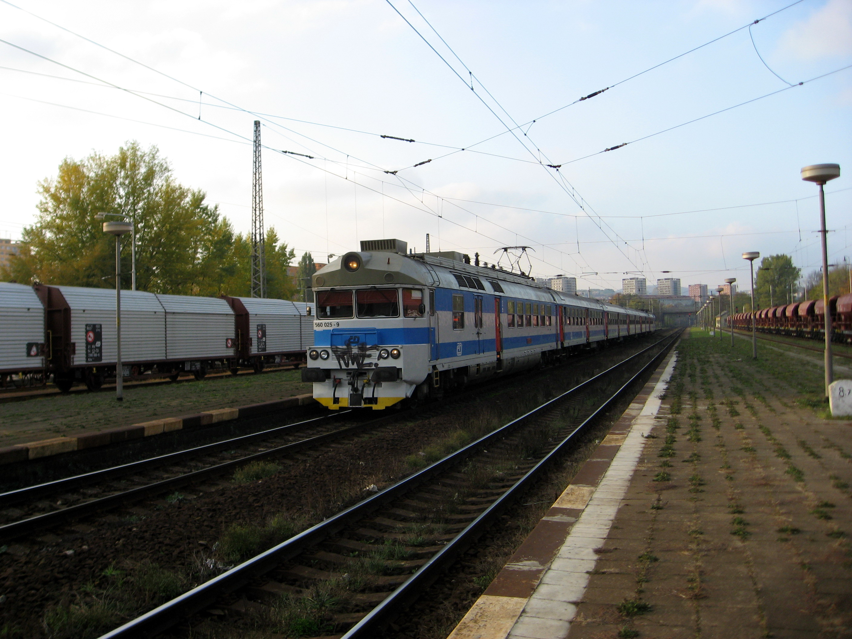 Vlak v Králově Poli